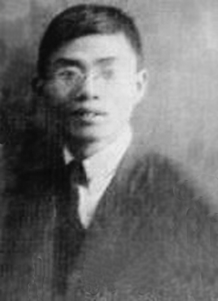 余家菊